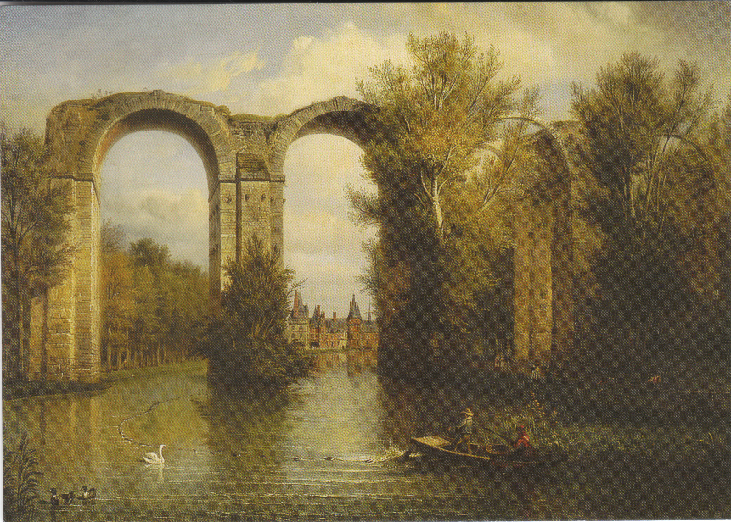 Huile sur toile, François-Edmée Ricois, réplique d'atelier